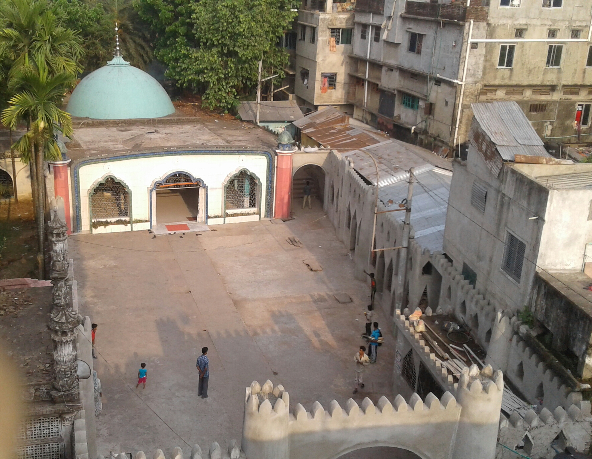 বদর আউলিয়া(রহ.) মাজার।